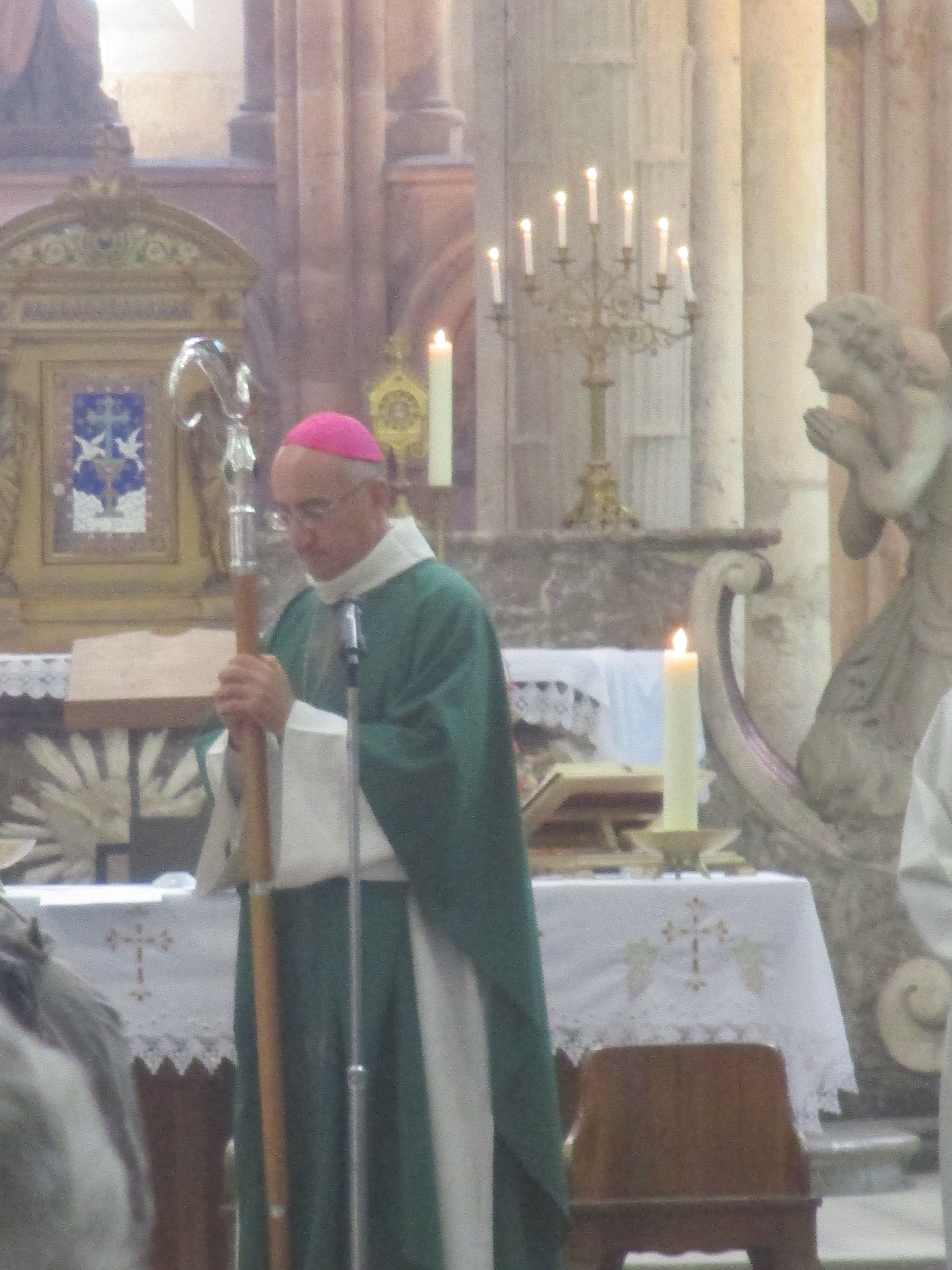 Mgr Giraud le 3 septembre 2017 en l'église de Villeneuve-sur-Yonne.